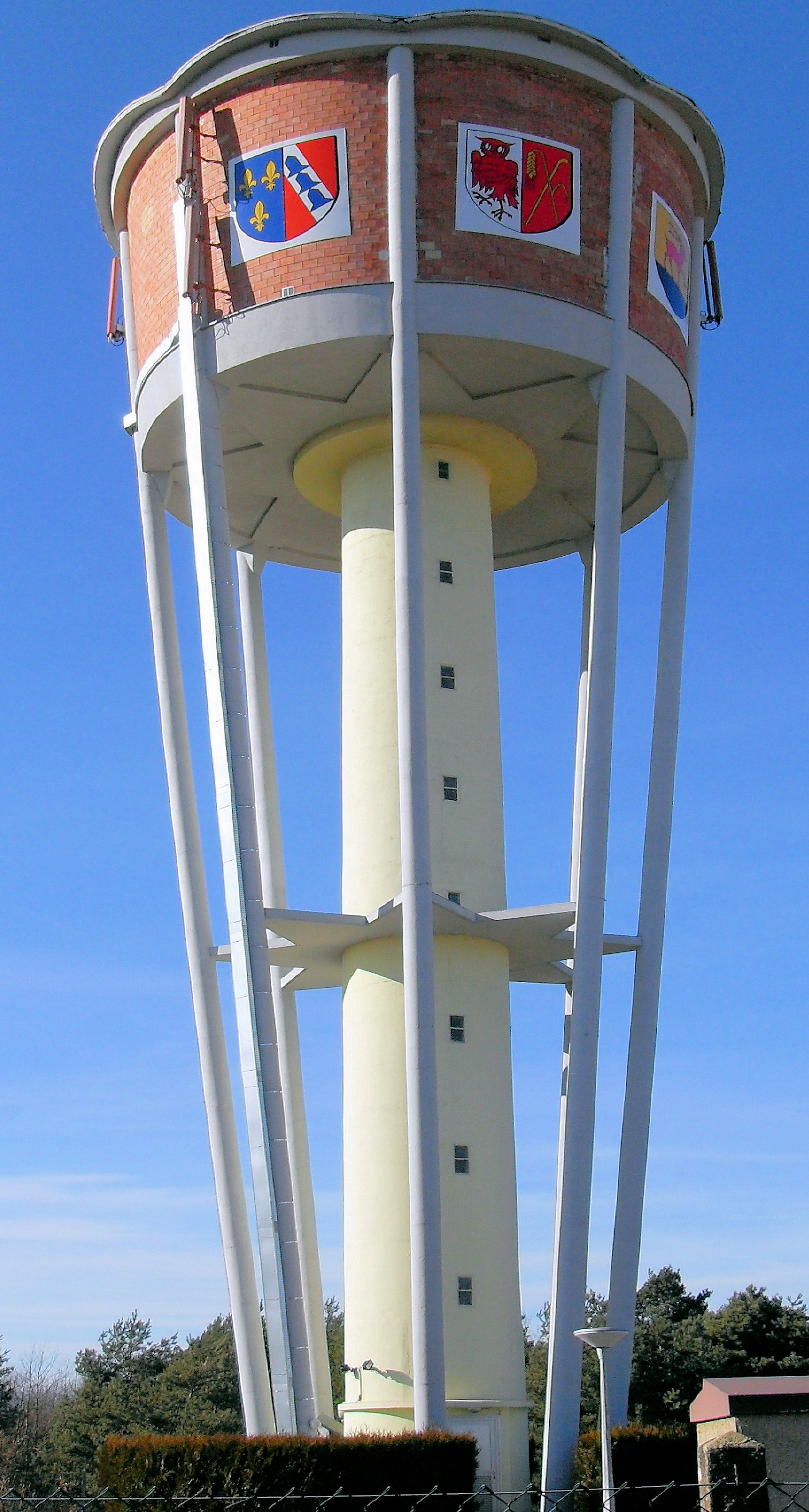 Château d'Eau d'Hirtzfelden